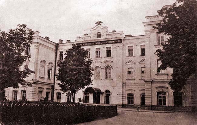 Klov Palace in 1901